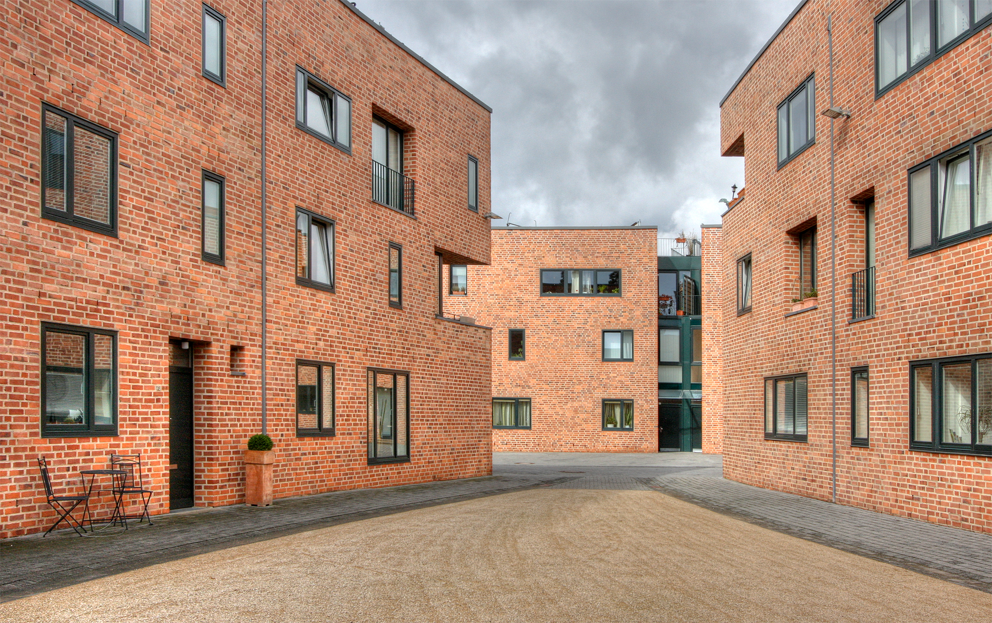 Chronos-Quartier, Wohnbebauung in Hennef (Sieg). Architekten: Peter Böhm